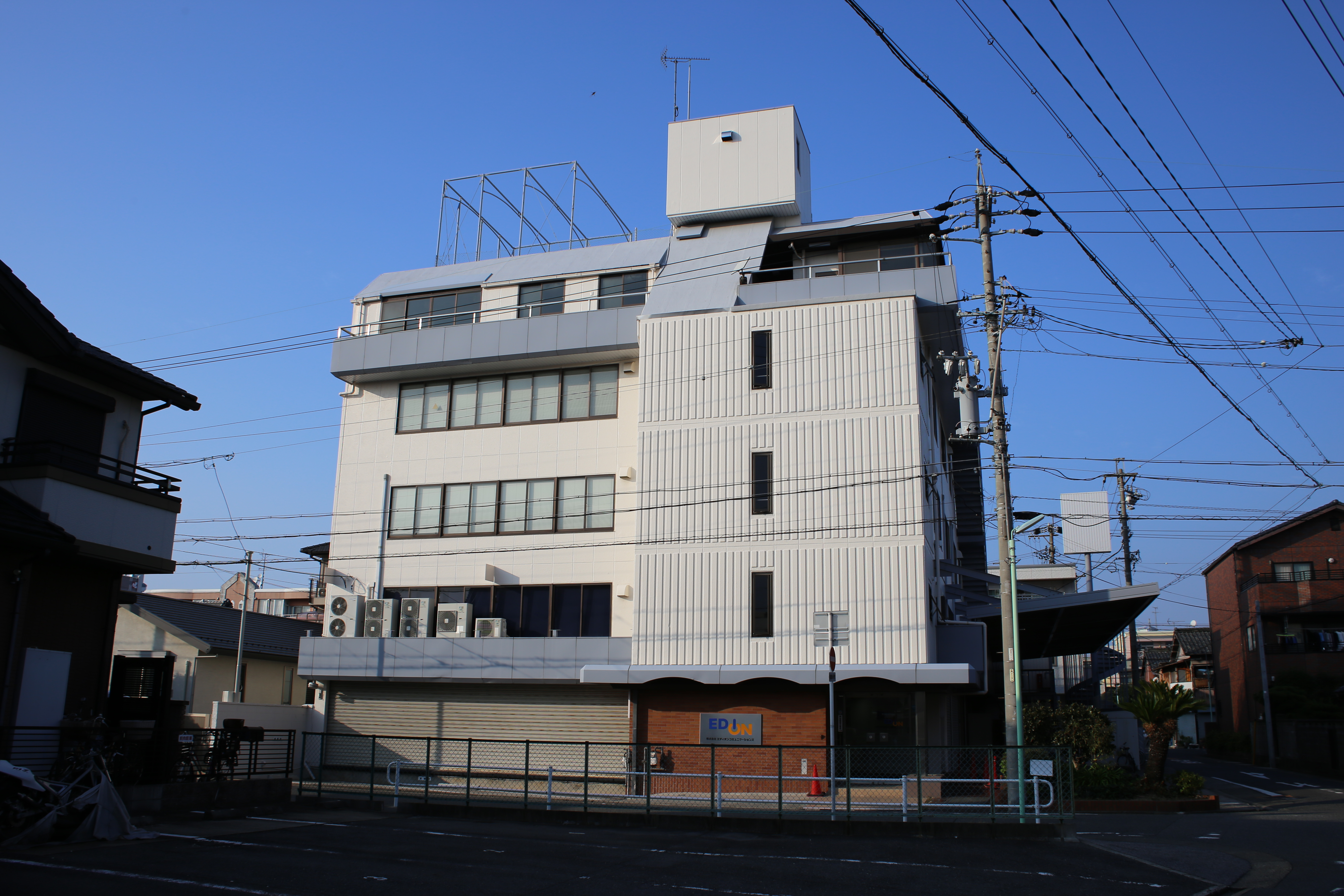 名古屋市中村区烏森町のエディオンコミュニケーション本社を東側公道南側より撮影